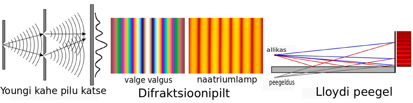 Youngi kahe pilu katse ning Lloydi peegel